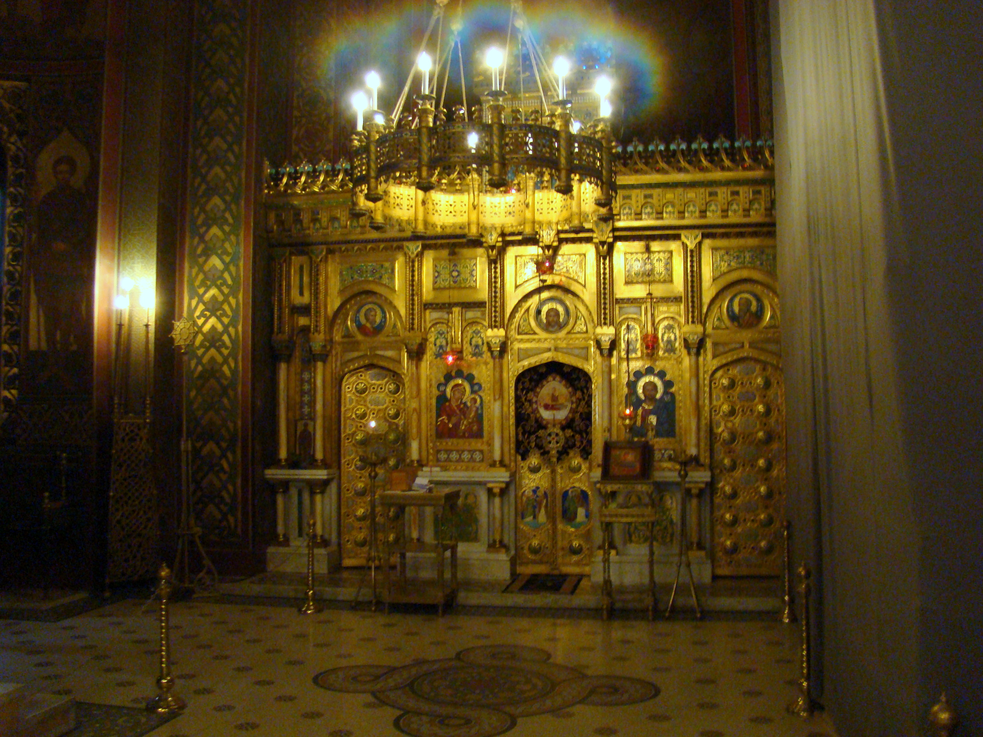 Biserica Episcopală "Adormirea Maicii Domnului" 01